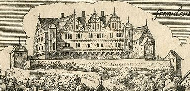 Burg Kollenberg, Gesamtansicht von Süden. Detail einer Kupferradierung von Eberhard Kieser in Daniel Meisners Thesaurus philopoliticus, Frankfurt a.M., 1625 (irrtümlich "Frewdenberg am Maÿn" bezeichnet)